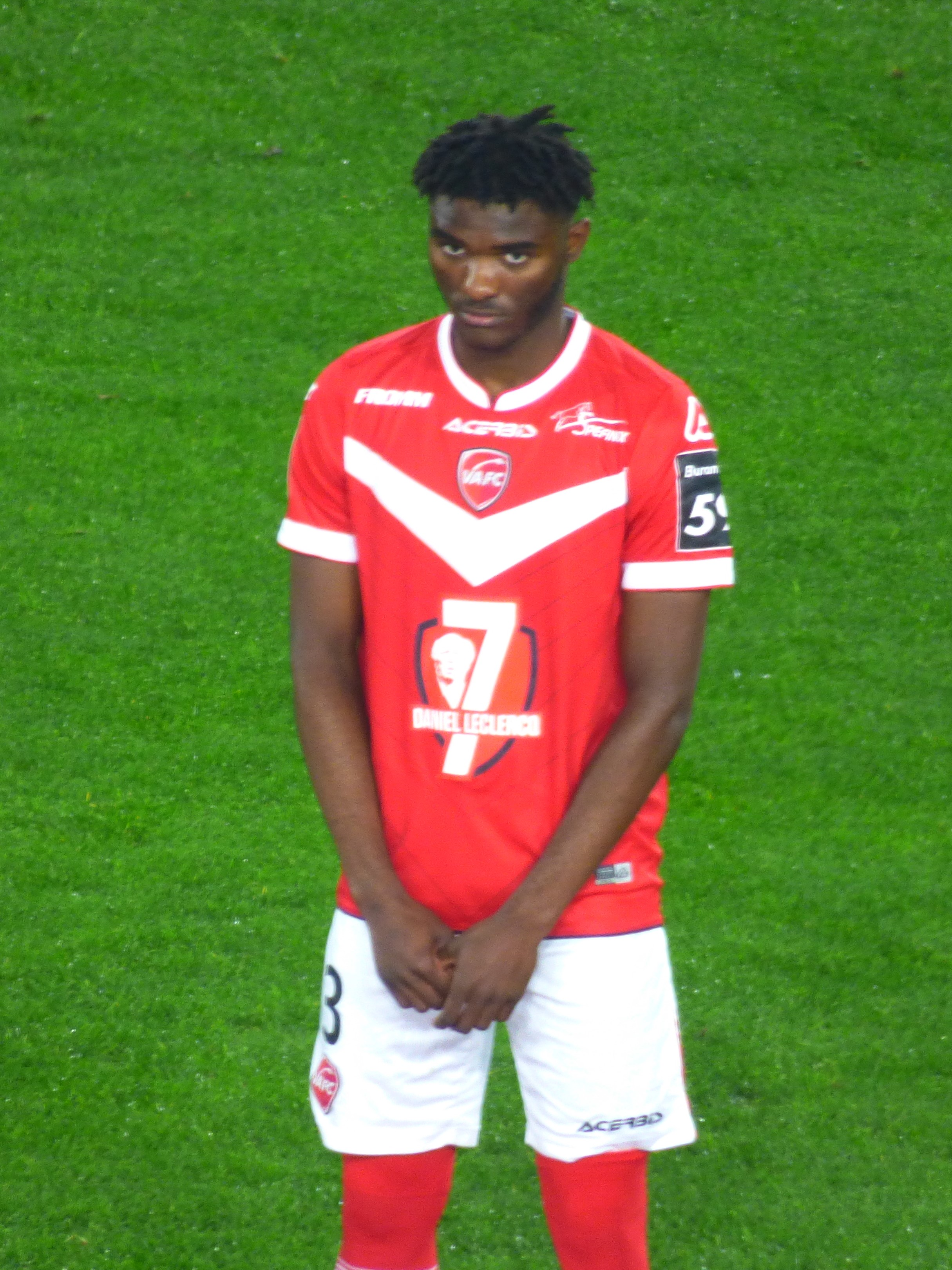 Lilian Brassier avant le match Valenciennes FC / RC Lens, comptant pour la seizième journée du championnat de France de football de Ligue 2 2019-2020, le 29 novembre 2019.